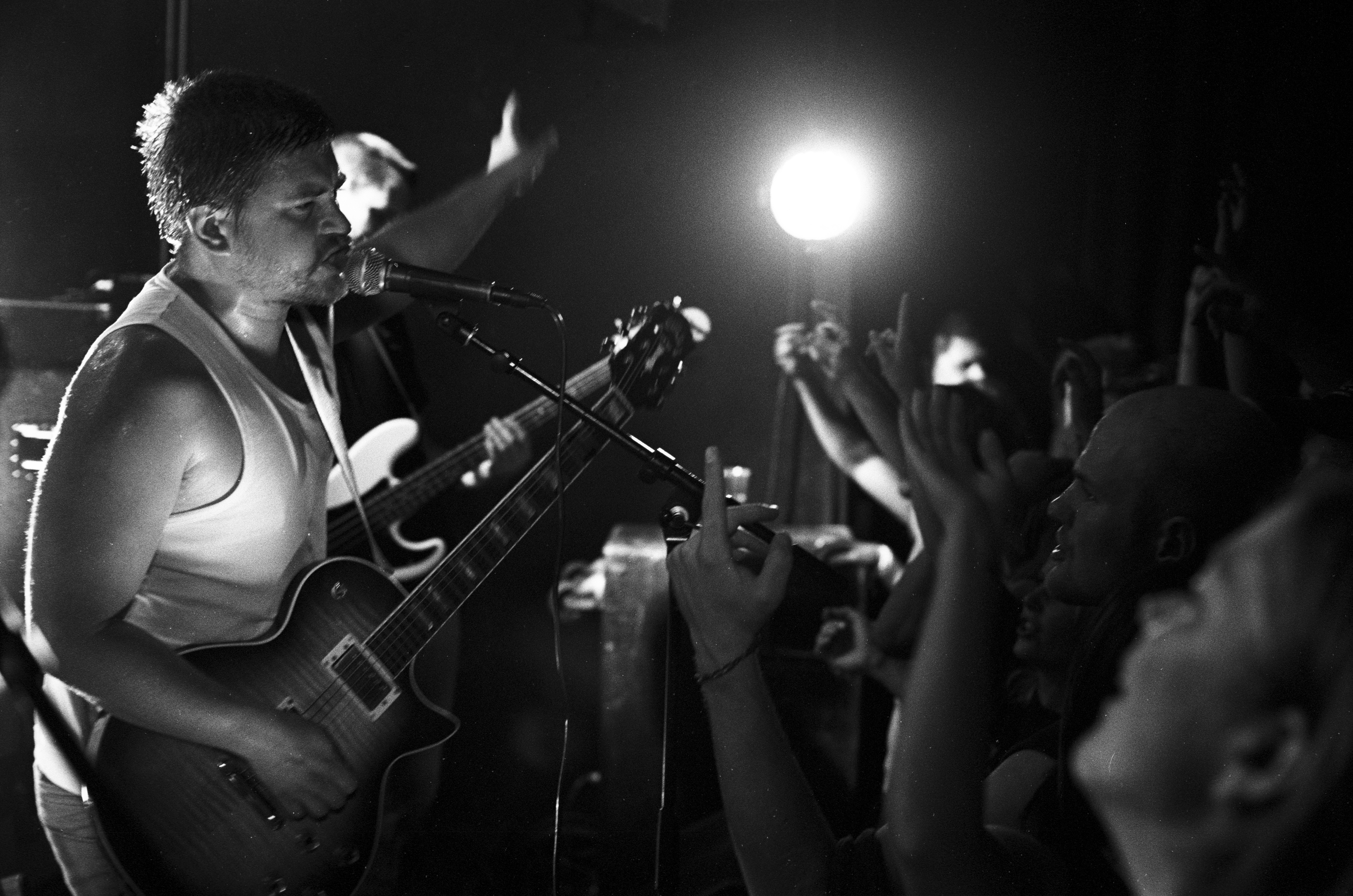 Tyyl! på Studentersamfundet i Trondhjem